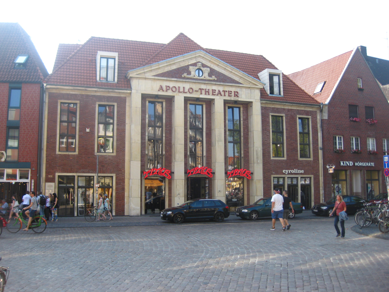 Architekt Haus Ostermann